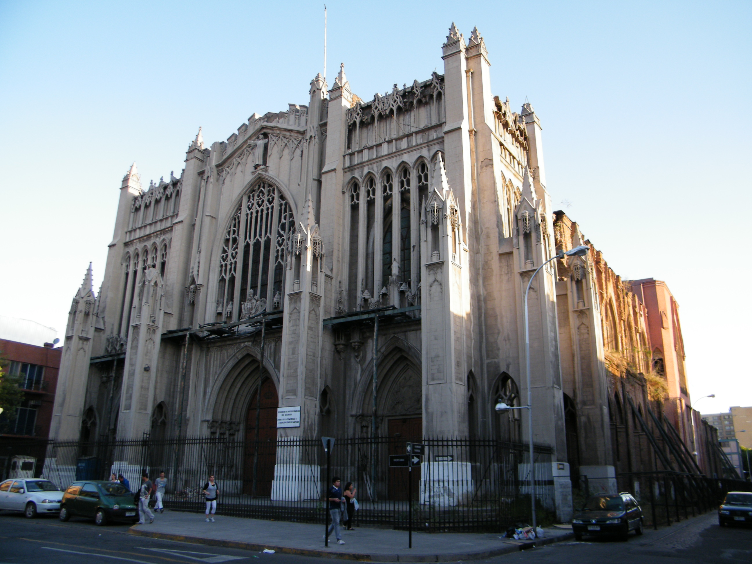 Basílica del Salvador This is a photo of a national monument in Chile: 207